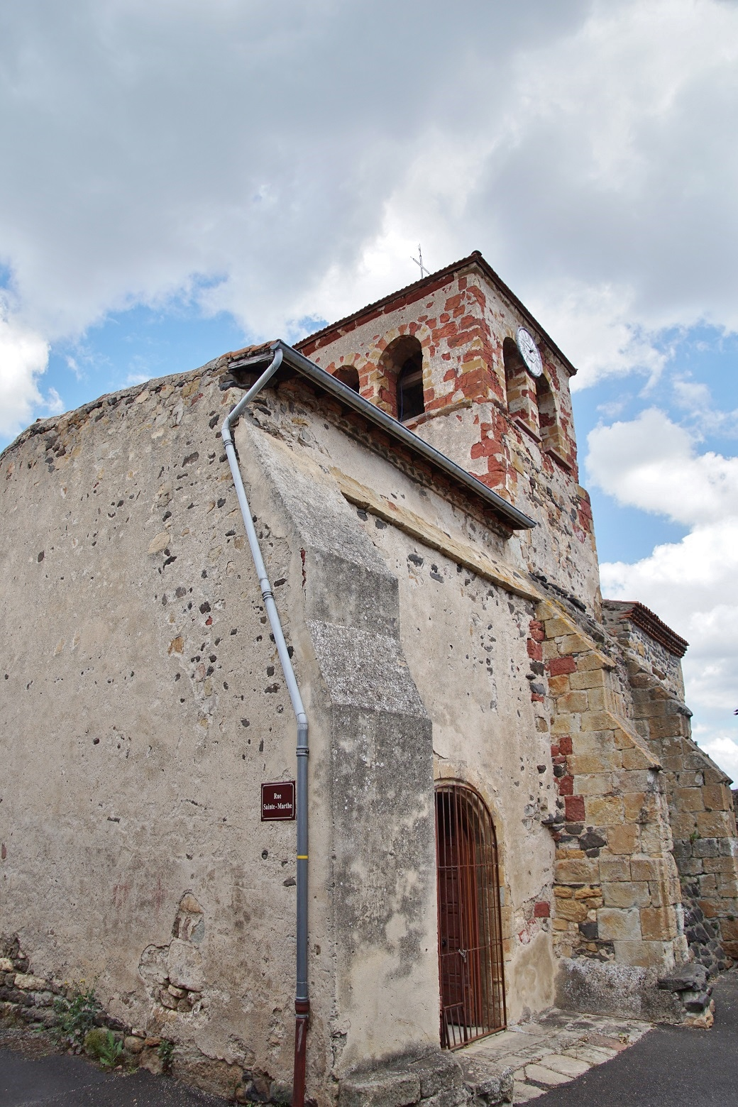 Puy de Dôme